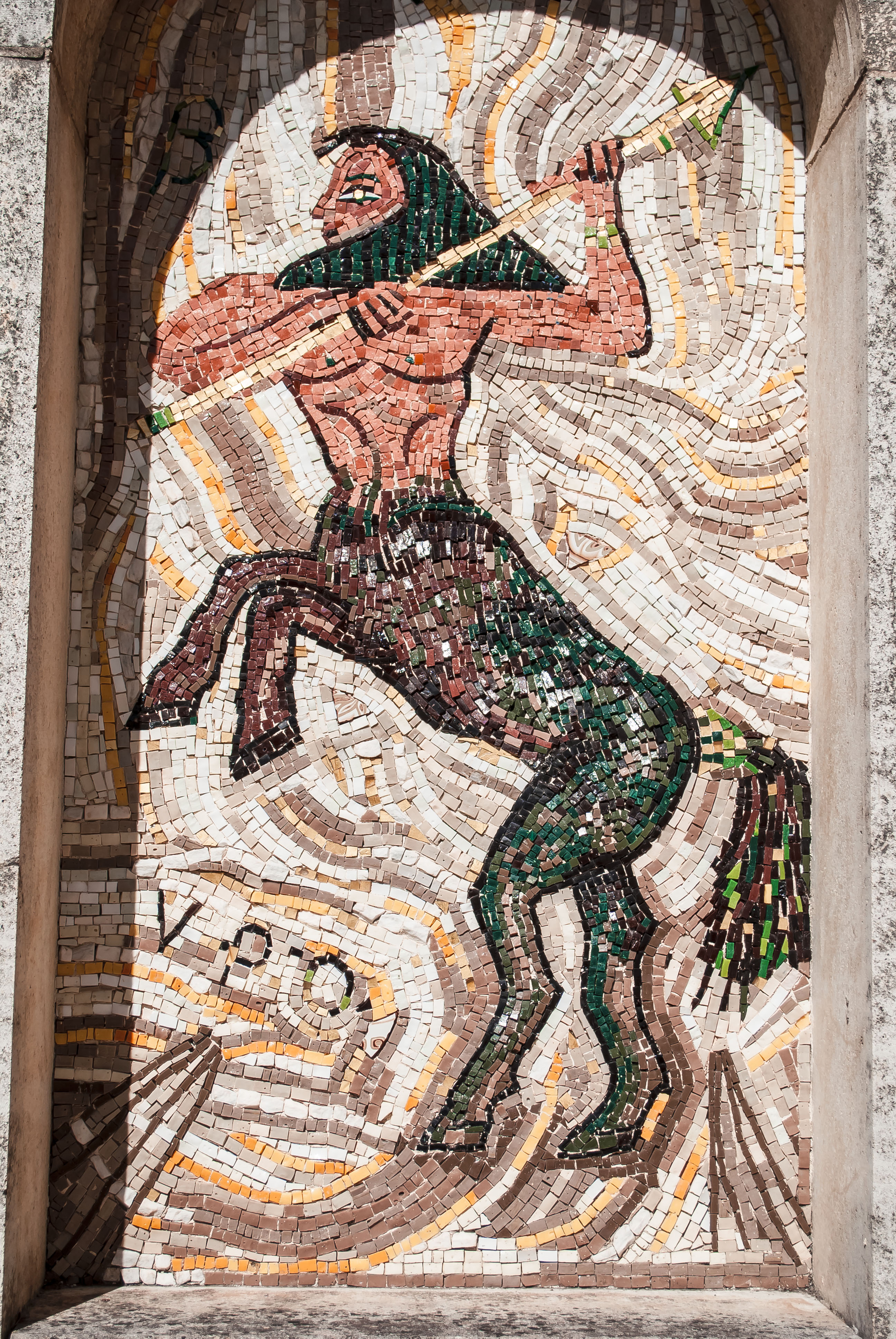 Teatro "Costantino Belluscio" This is a photo of a monument which is part of cultural heritage of Italy.